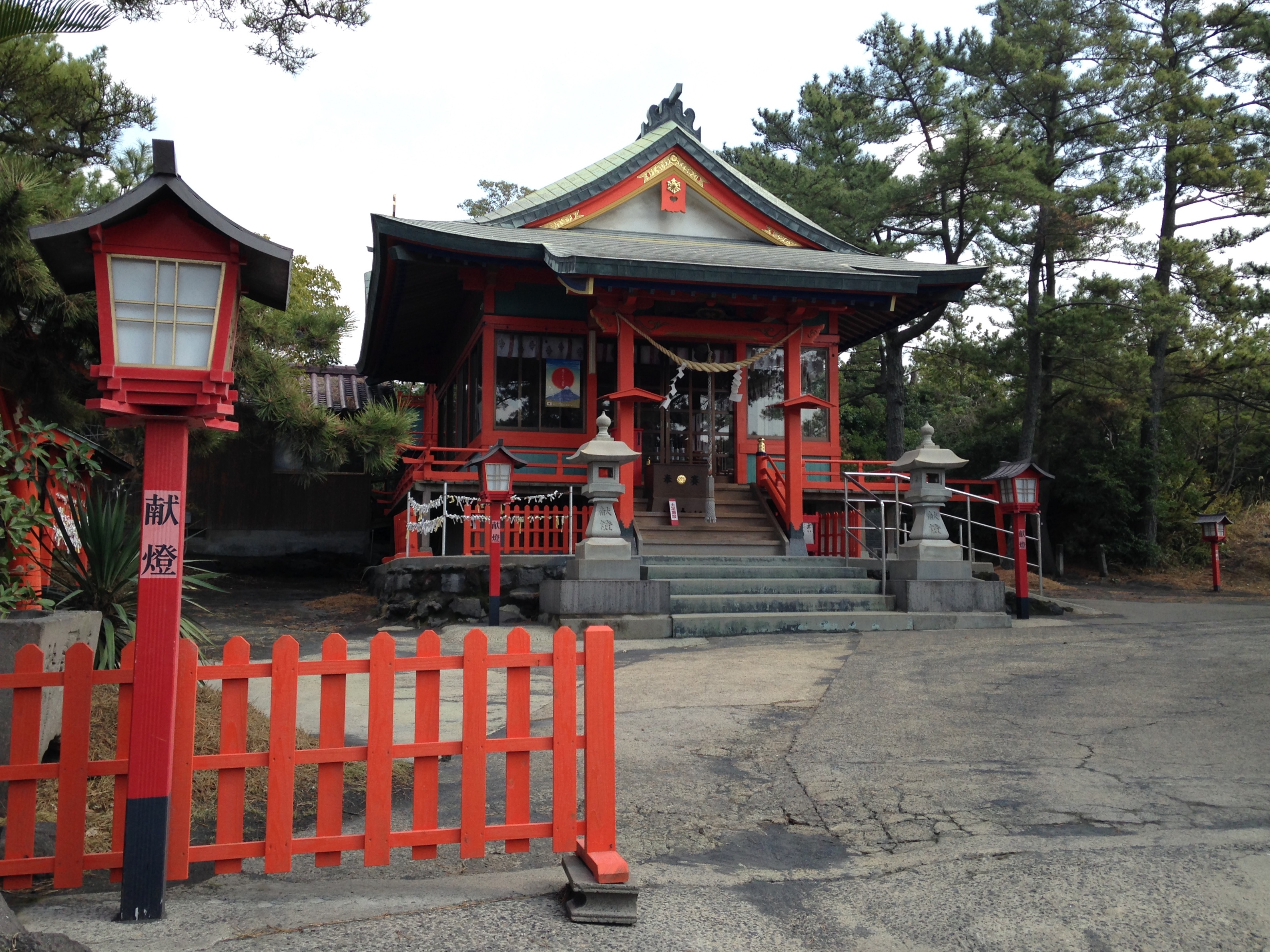 月読神社の拝殿